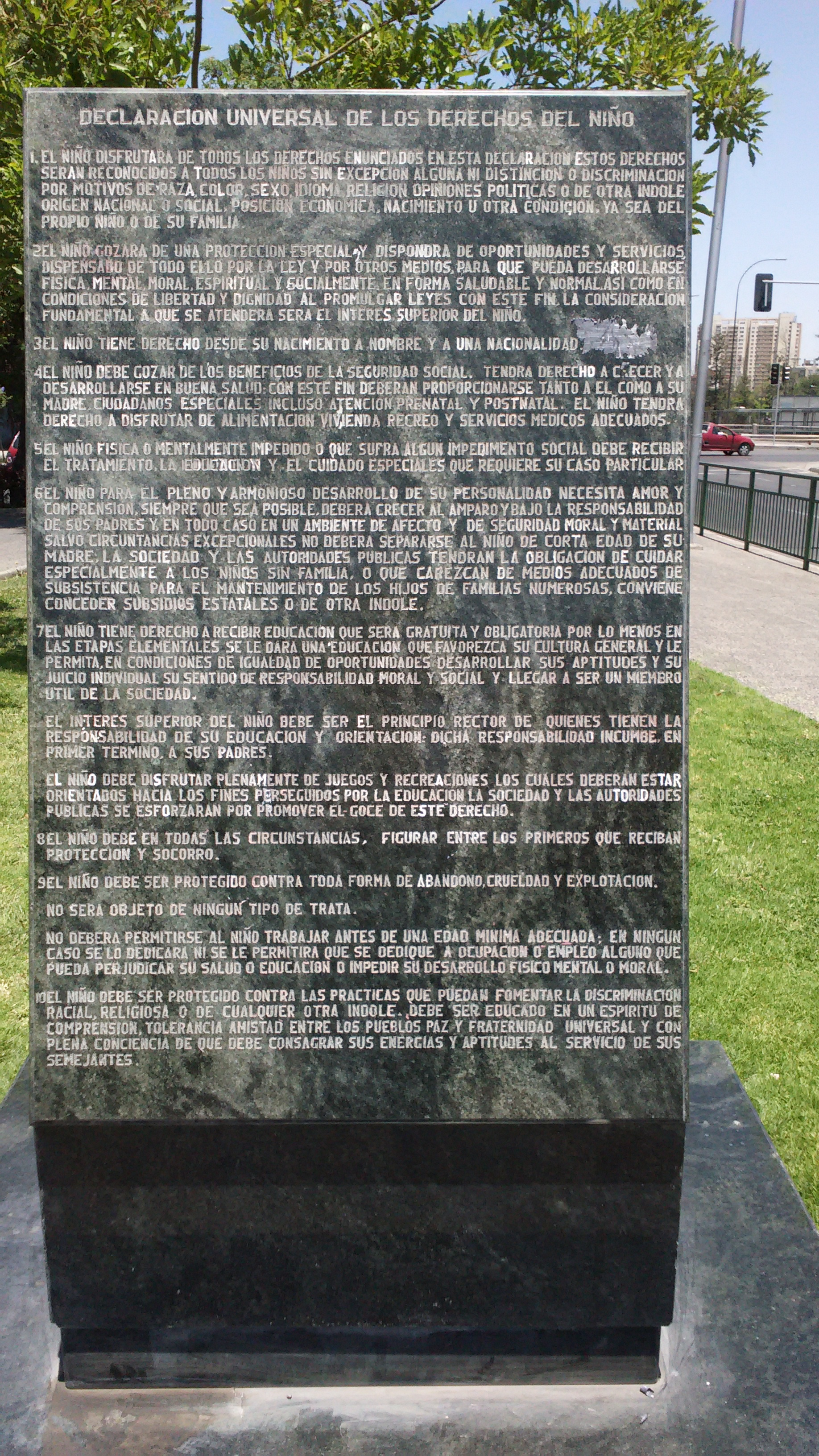 Placa de los Derechos del Niño en Santiago de Chile